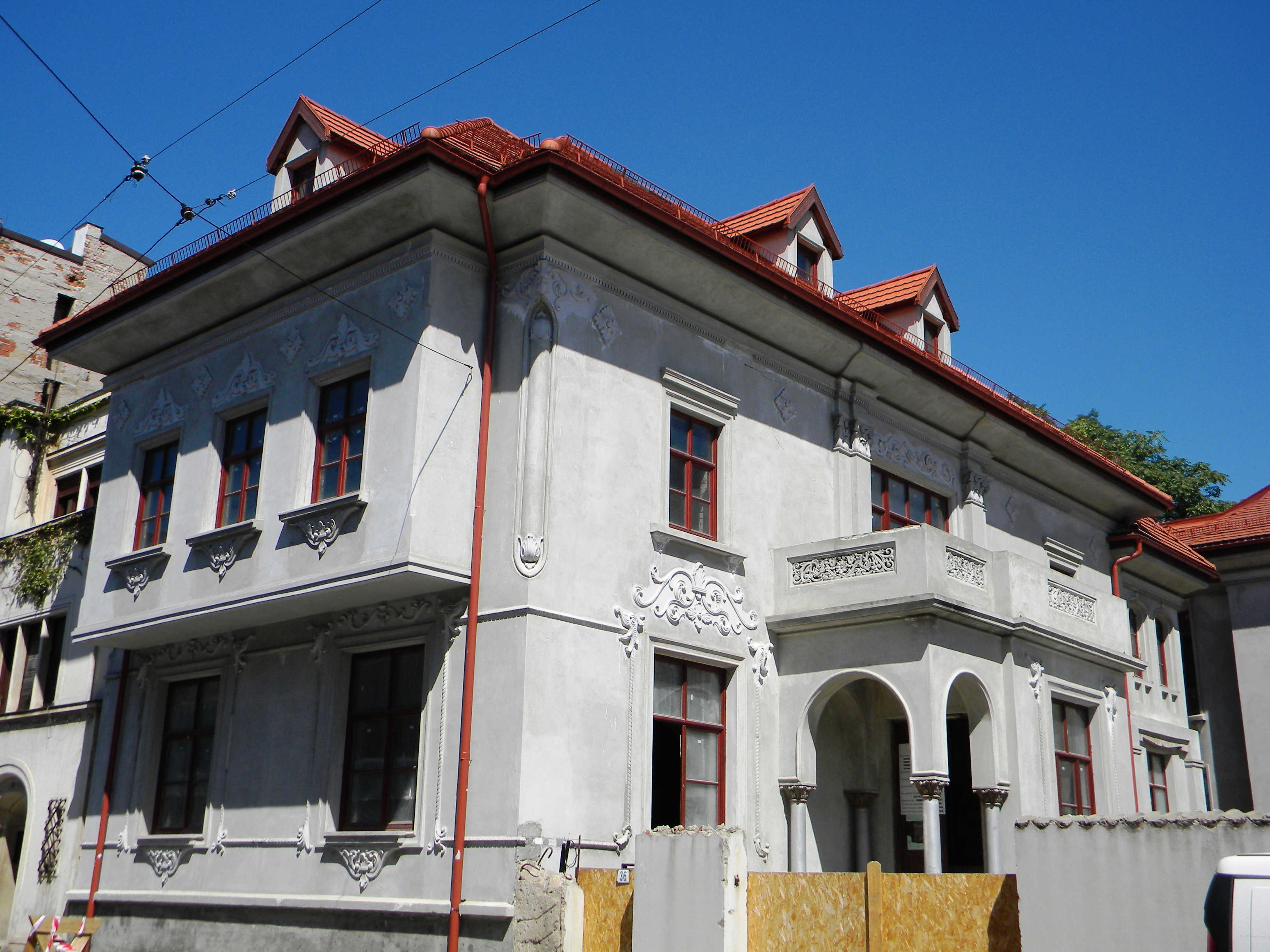 Bucuresti, Romania, Str. Henri Coanda nr. 36, Casa Argetoianu; B-II-m-B-18443 (casa pe colt)